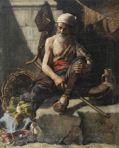 FRANCISZEK JAN MACHNIEWICZ. Odpoczynek